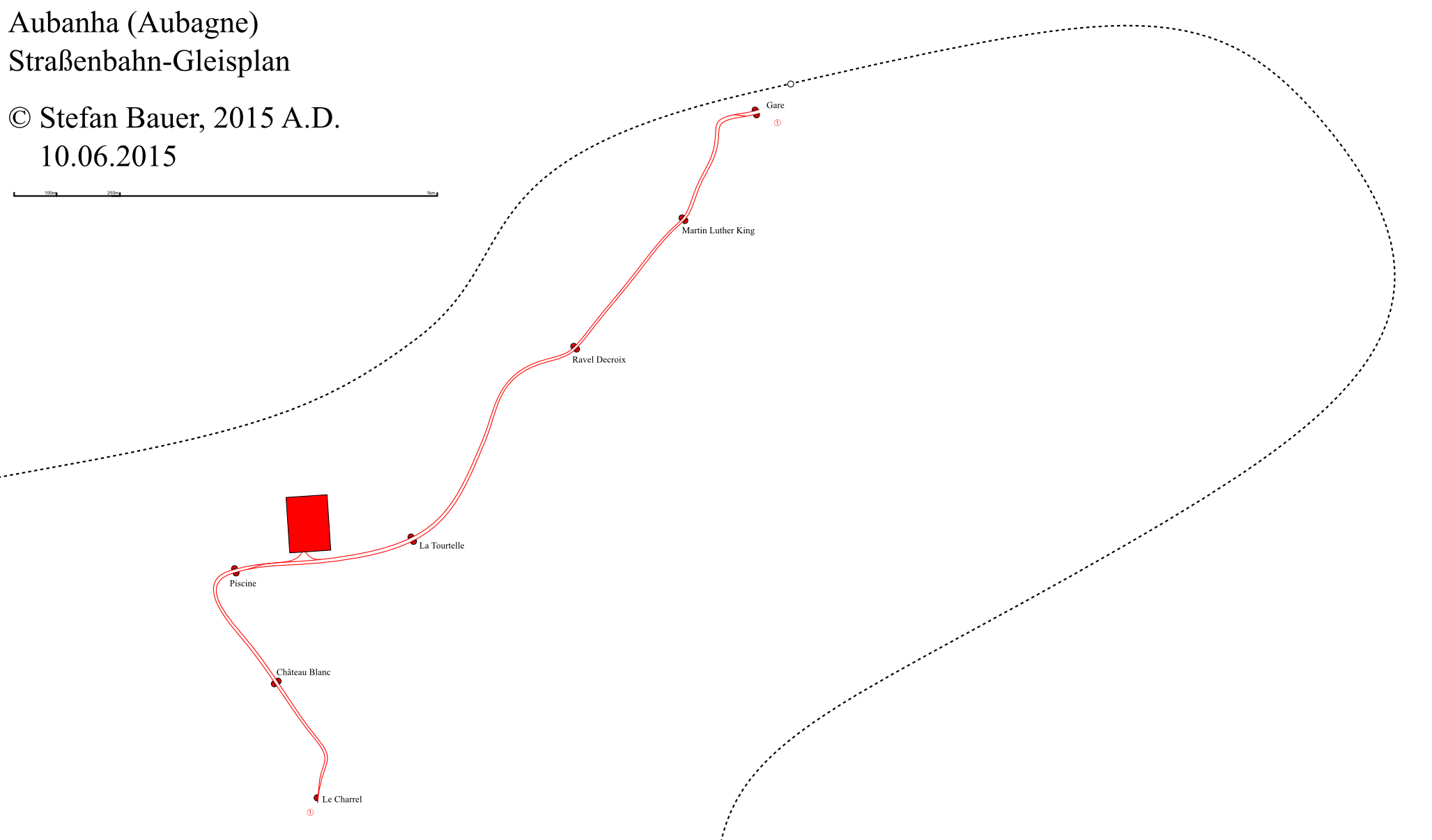 Mapa de las vias del tramvai de Aubanha 2015